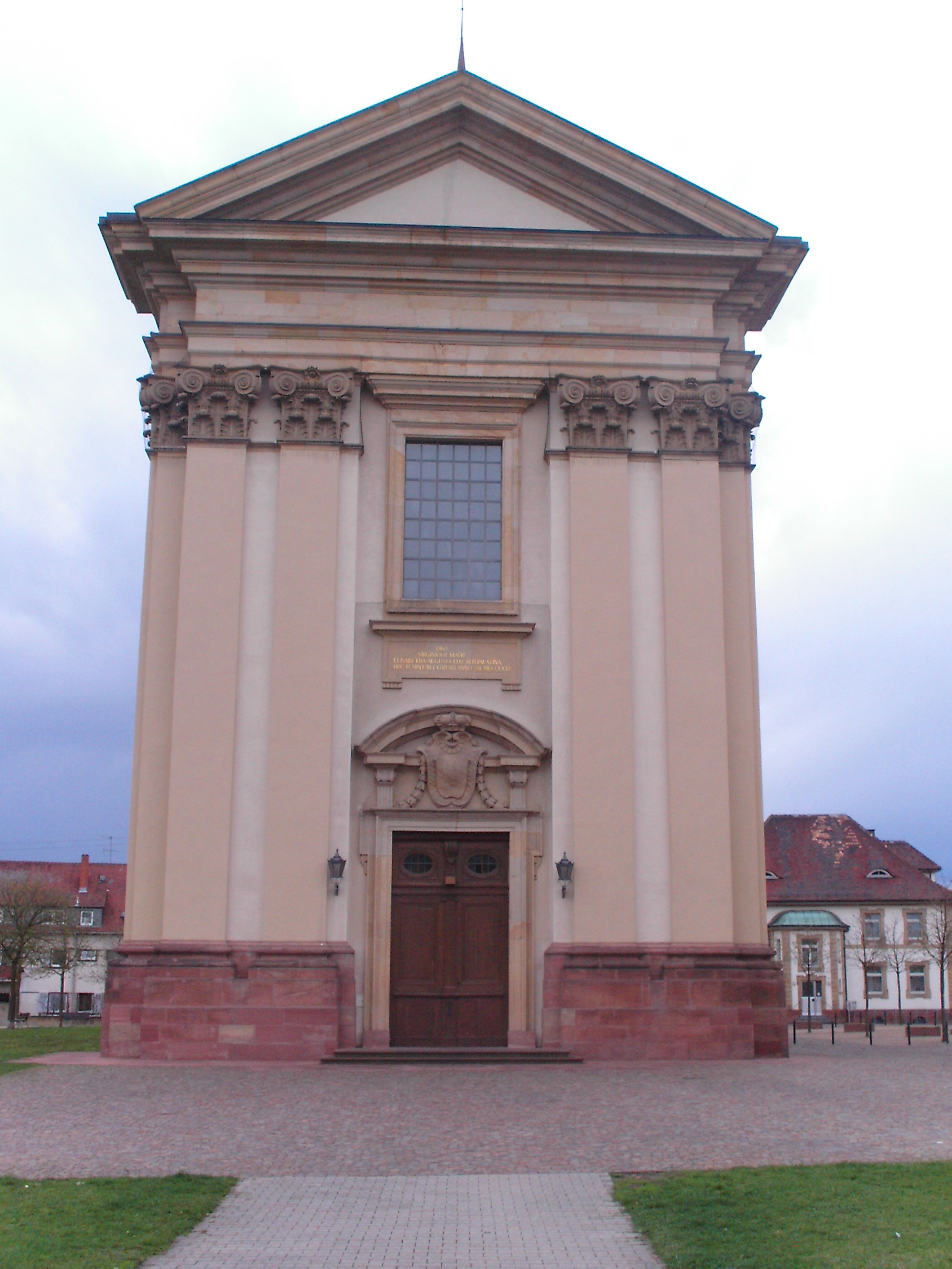 Wallfahrtskirche Oggersheim